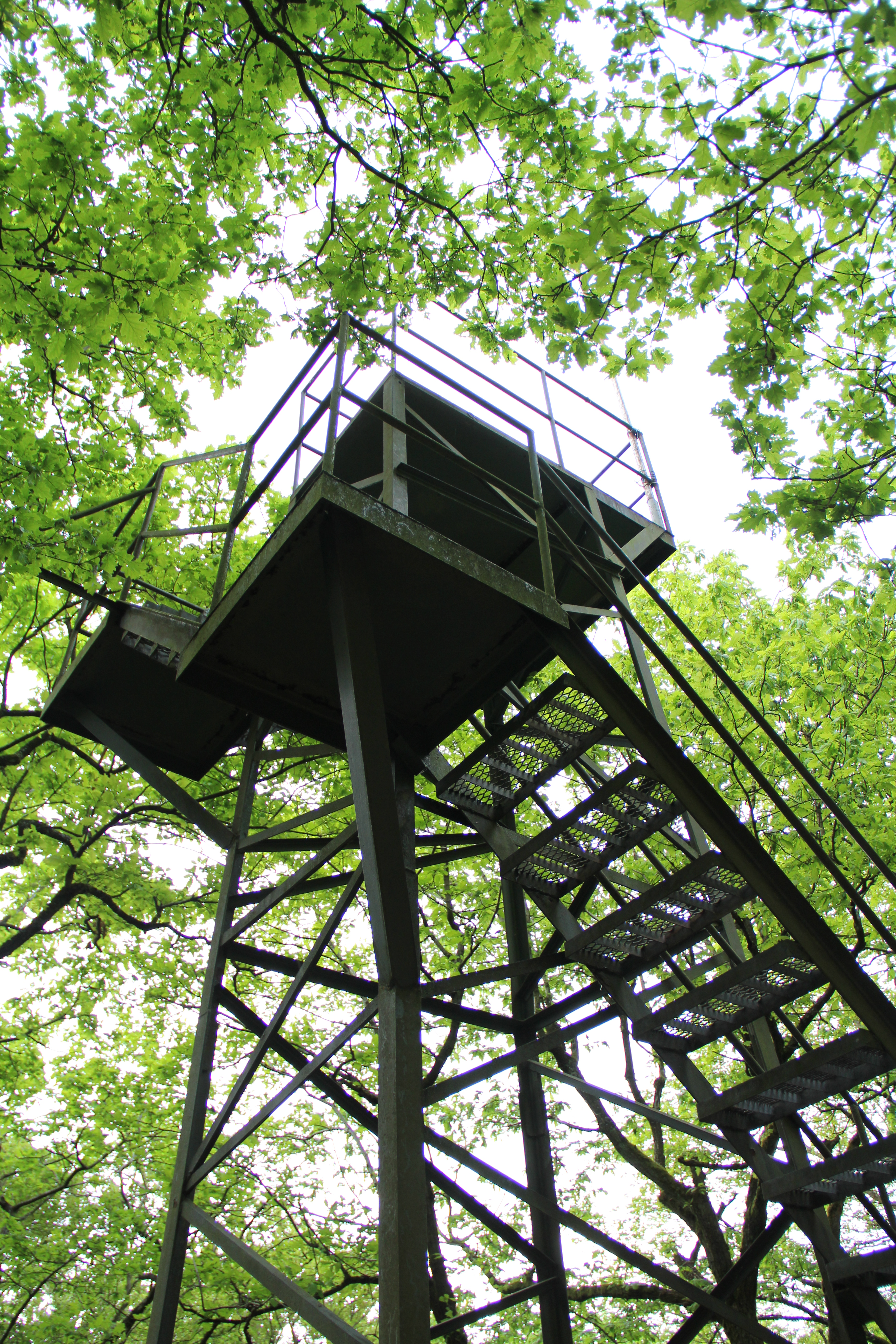 Der Berg "Köpfchen" bei Weidenhausen (inoff. "Weidenhäuser Koppe" in Anlehnung an benachbarte Koppe nahe Mornshausen)